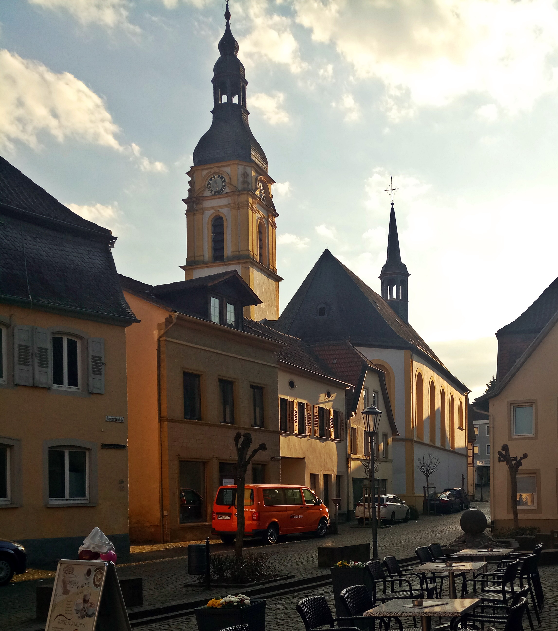 St. Antoniuskirche Meisenheim